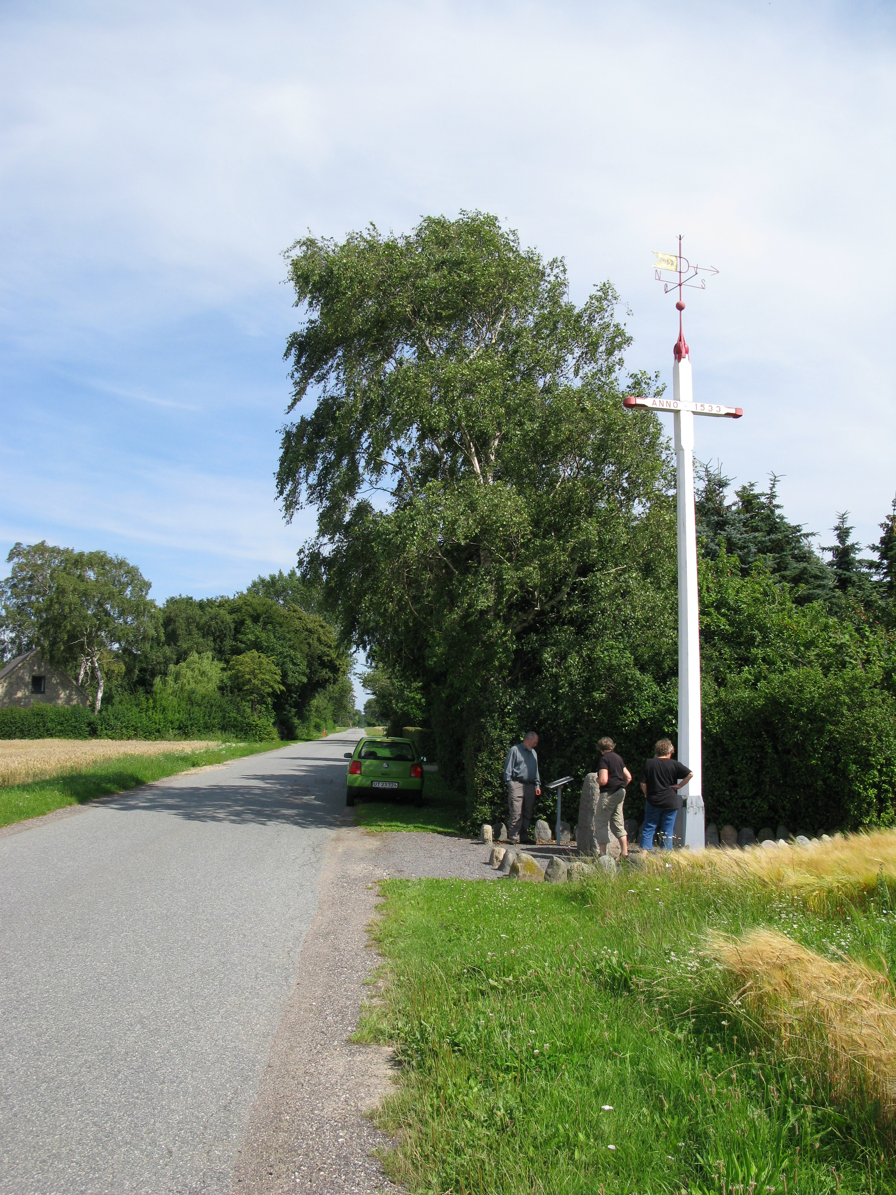 Skalkekorset ved Frejlev på Østlolland.